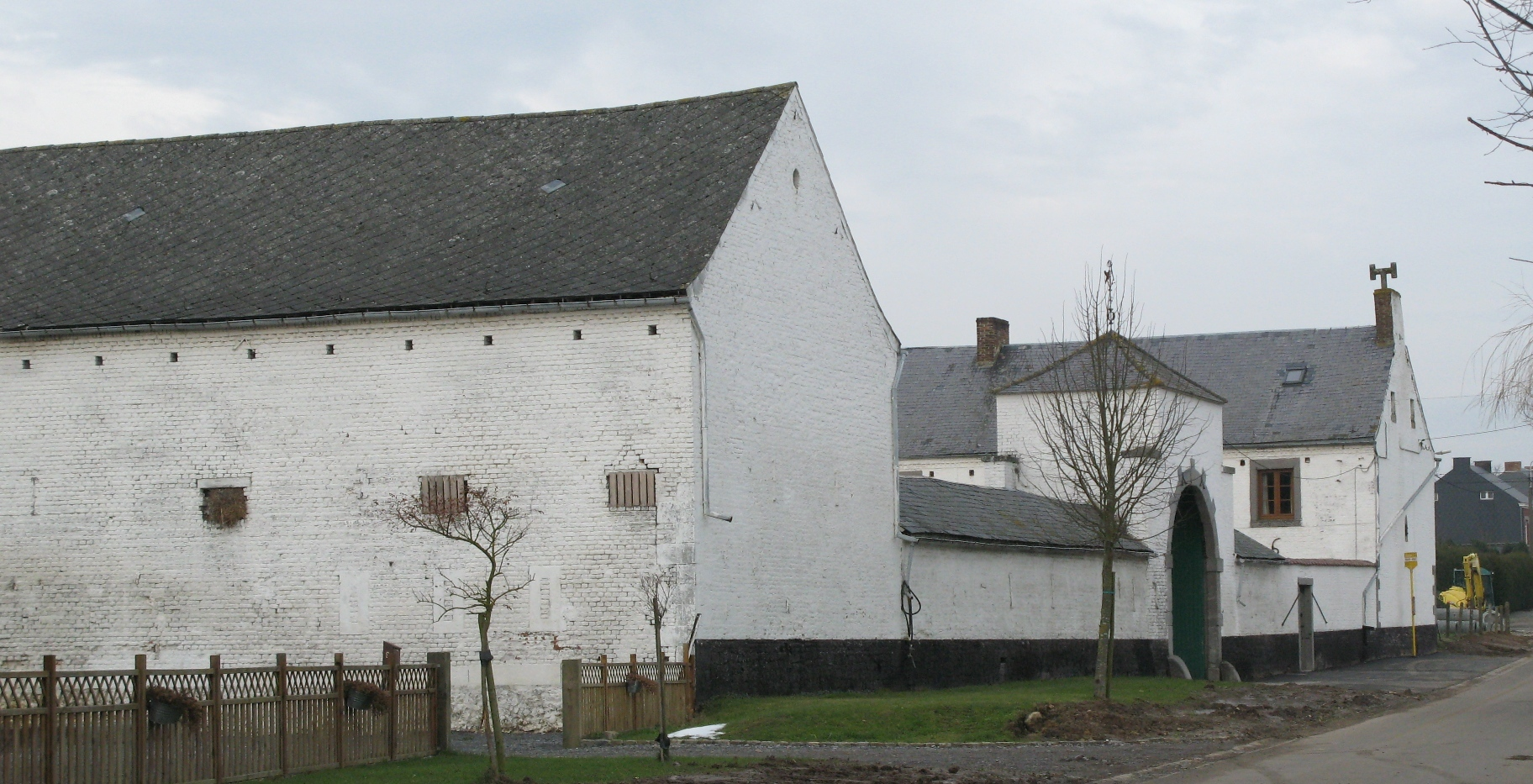 Ferme carrée zu Acosse.